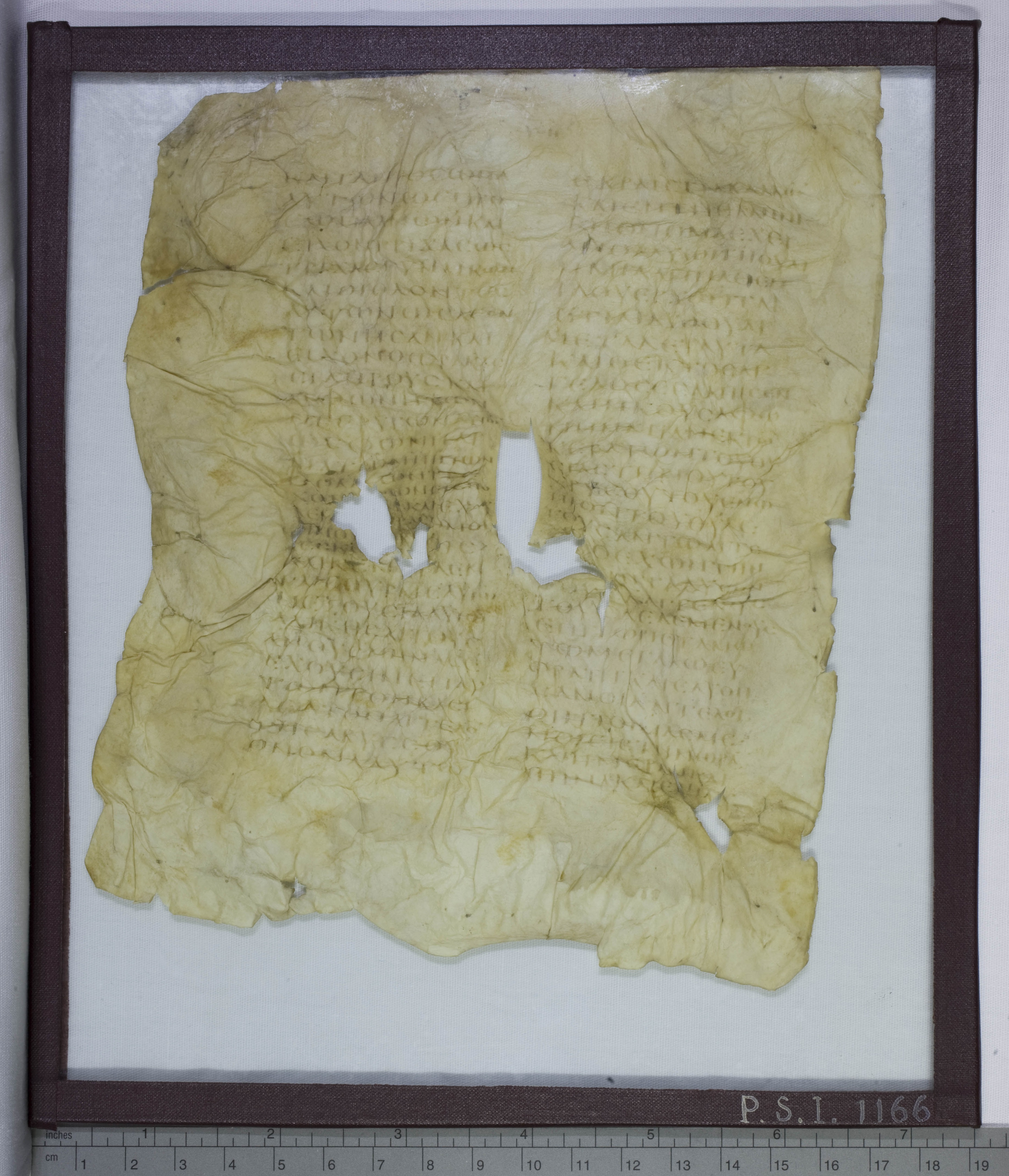 side recto